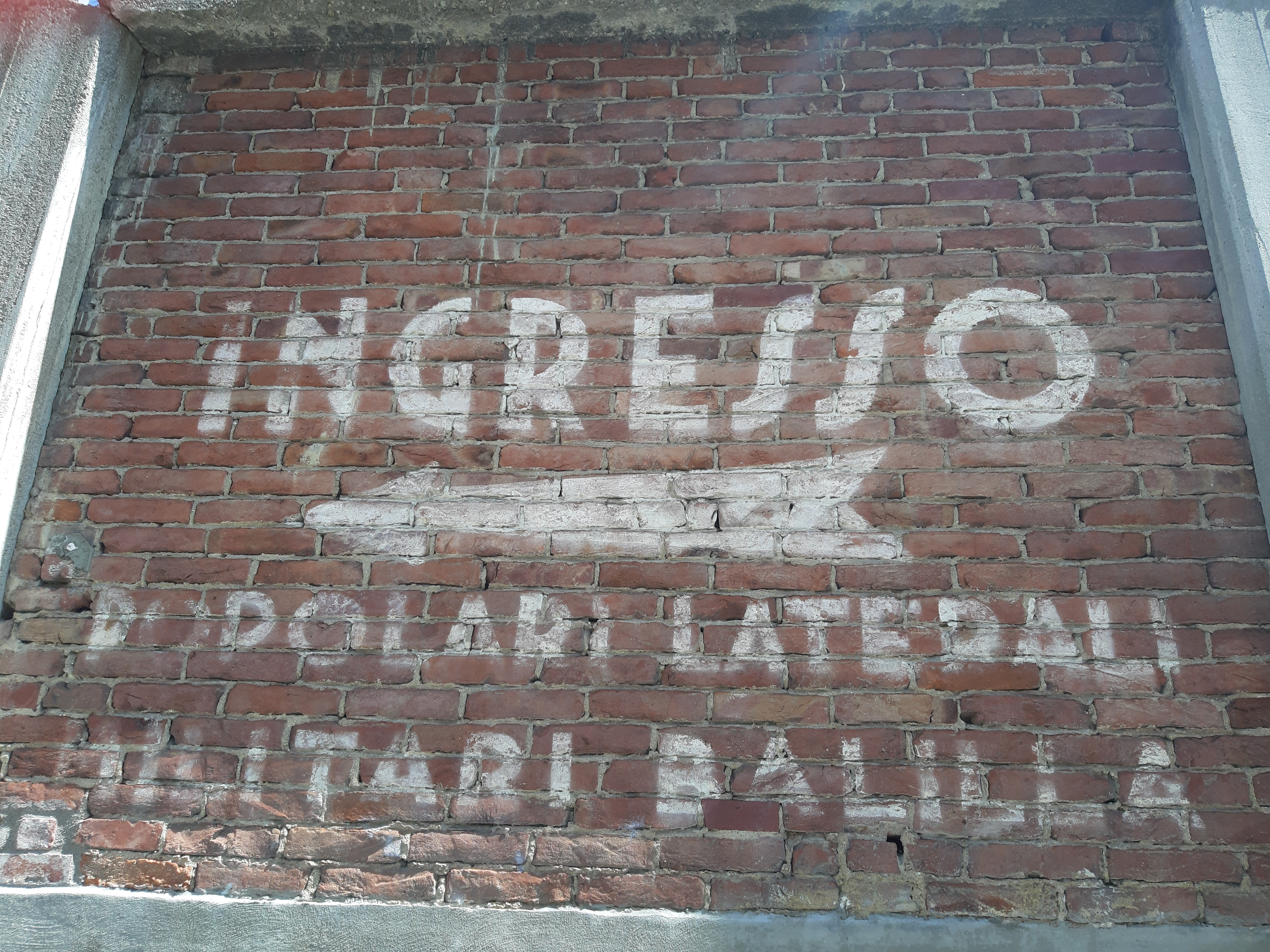 Tratto di muro storico Stadio Filadelfia